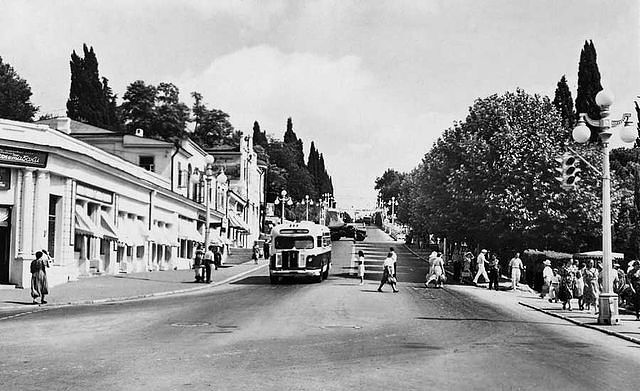 Сталинский проспект в Сочи, Россия